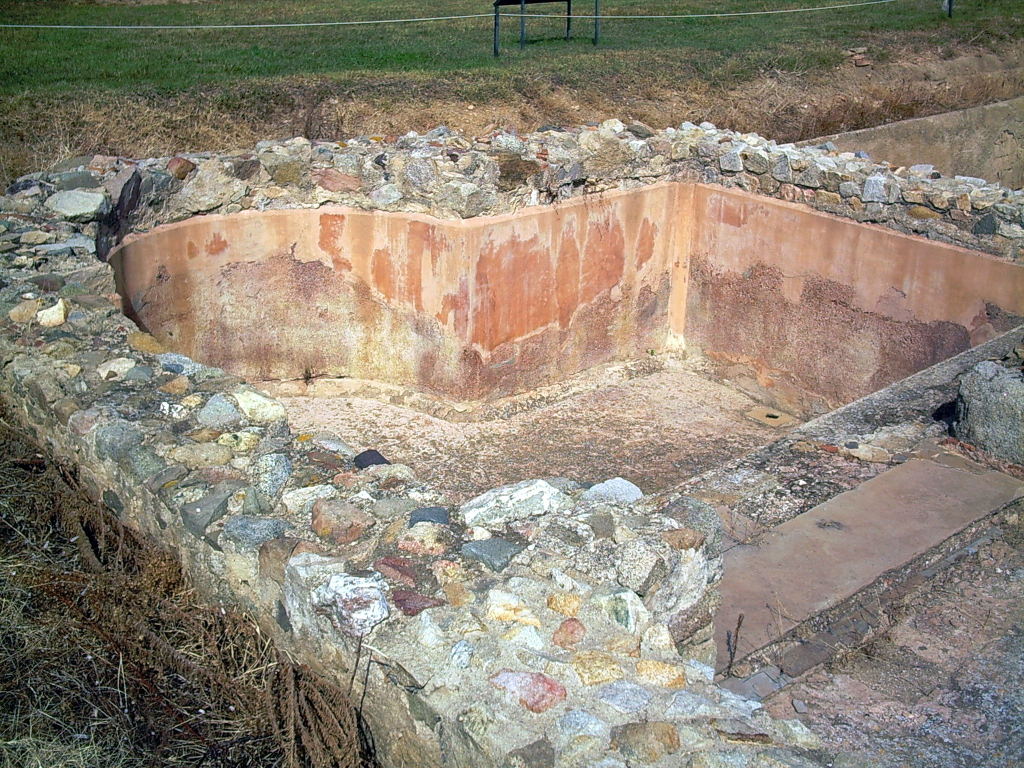 14 - Banys (balneae) freds o frigidarium, de la vil·la romana de Can Llauder. Mataró, el Maresme, (Catalunya).